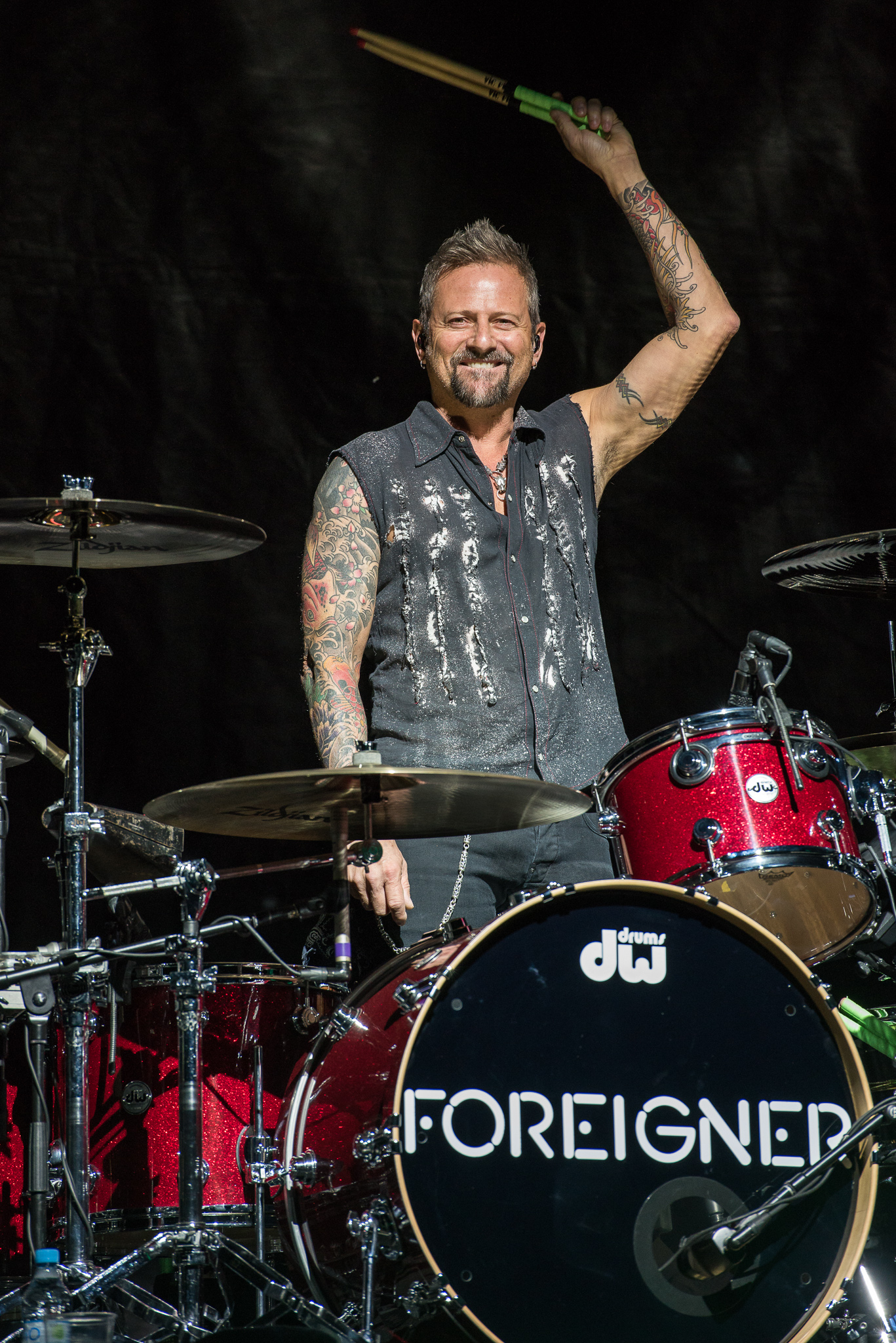 Brombachsee,Chris Frazier,Concertbüro Franken,Festival,Foreigner,Konzert,Lieder am See,Livekonzert,Livemusik,Musik